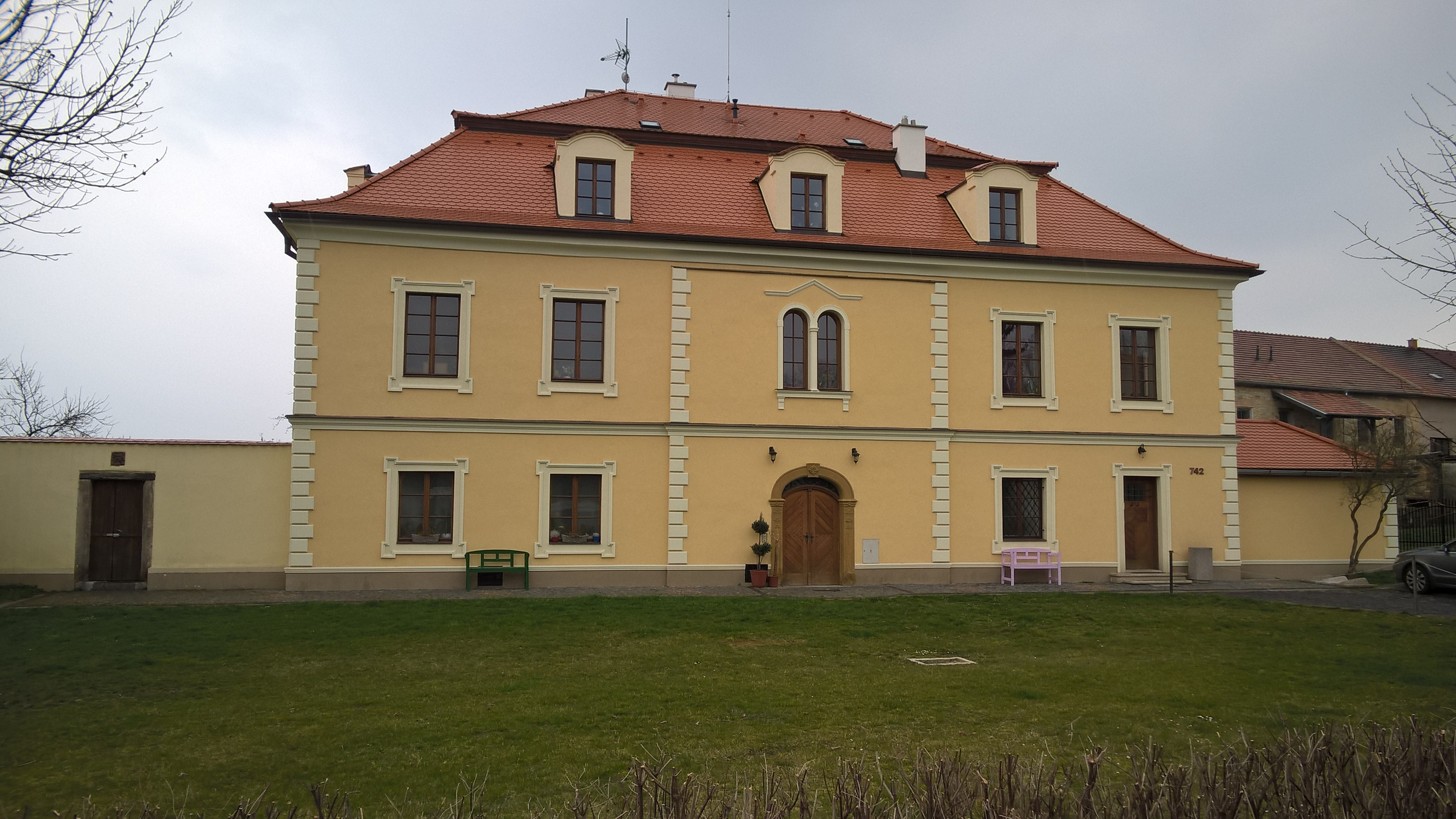 Panský dům, Na Rybníčku 742, Roudnice nad Labem.